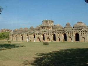 Hampi- Elephant Stables